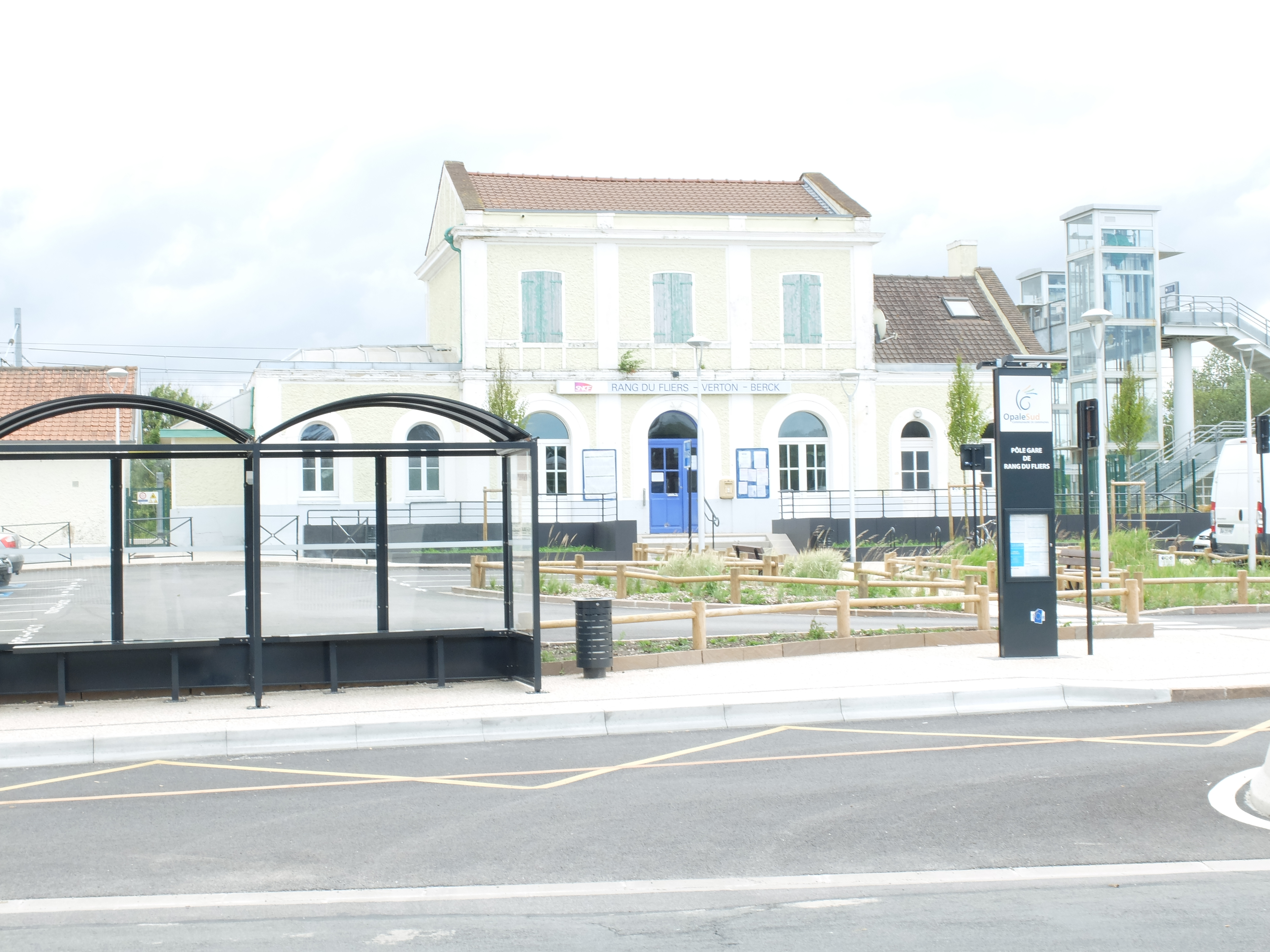 Vue du bâtiment voyageurs de la gare de Rang-du-Fliers.